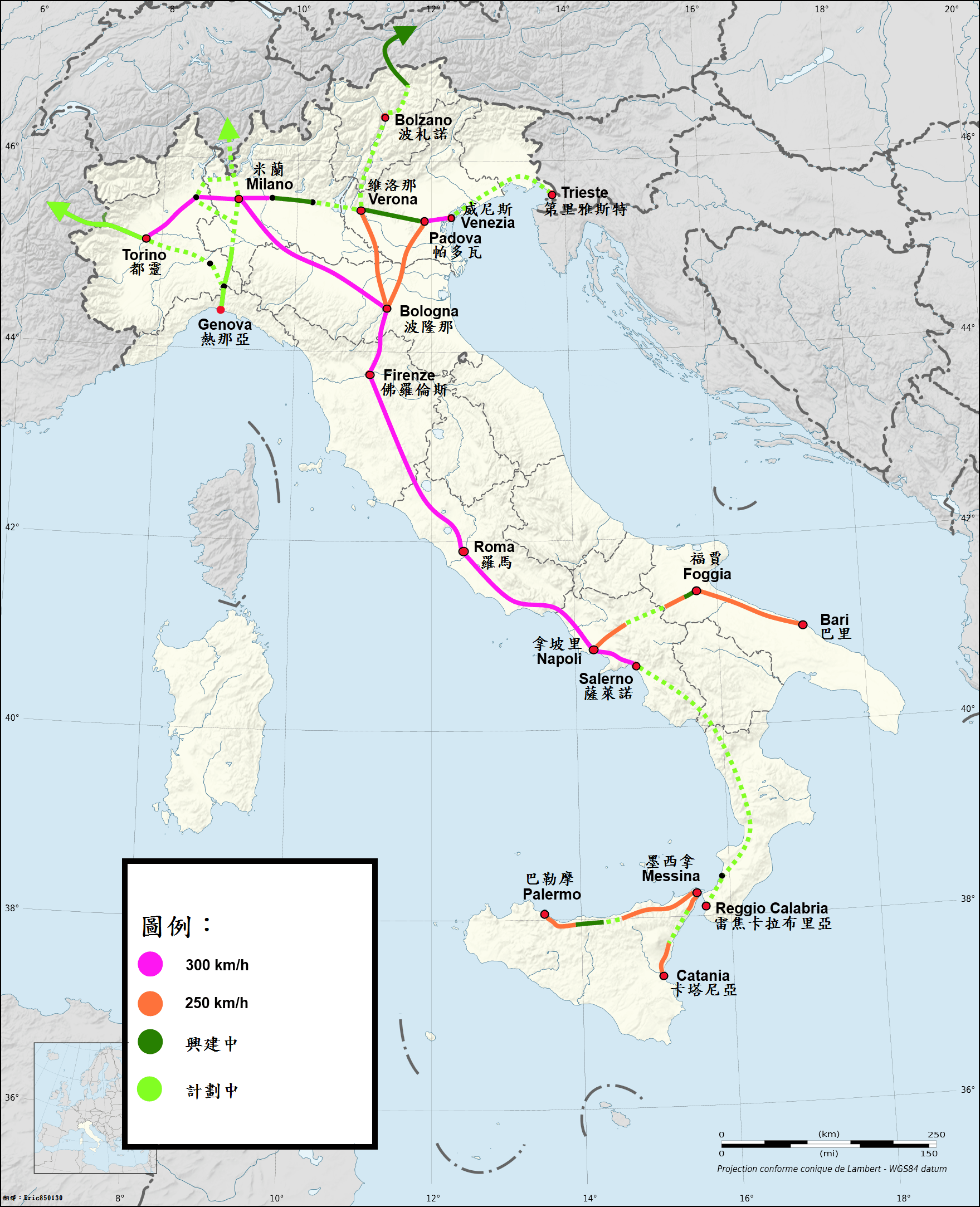 義大利高速鐵路路網圖-繁體中文版本